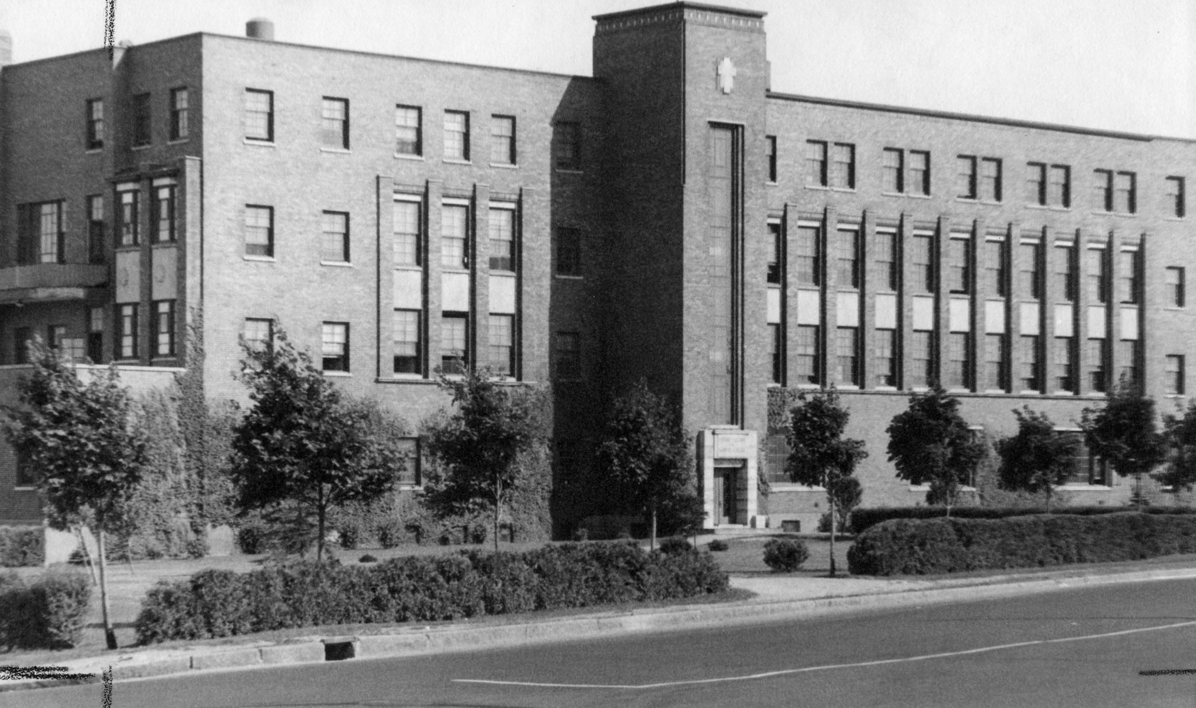 Pavillon Morin du Collège Sainte-Croix à Montréal circa 1955.